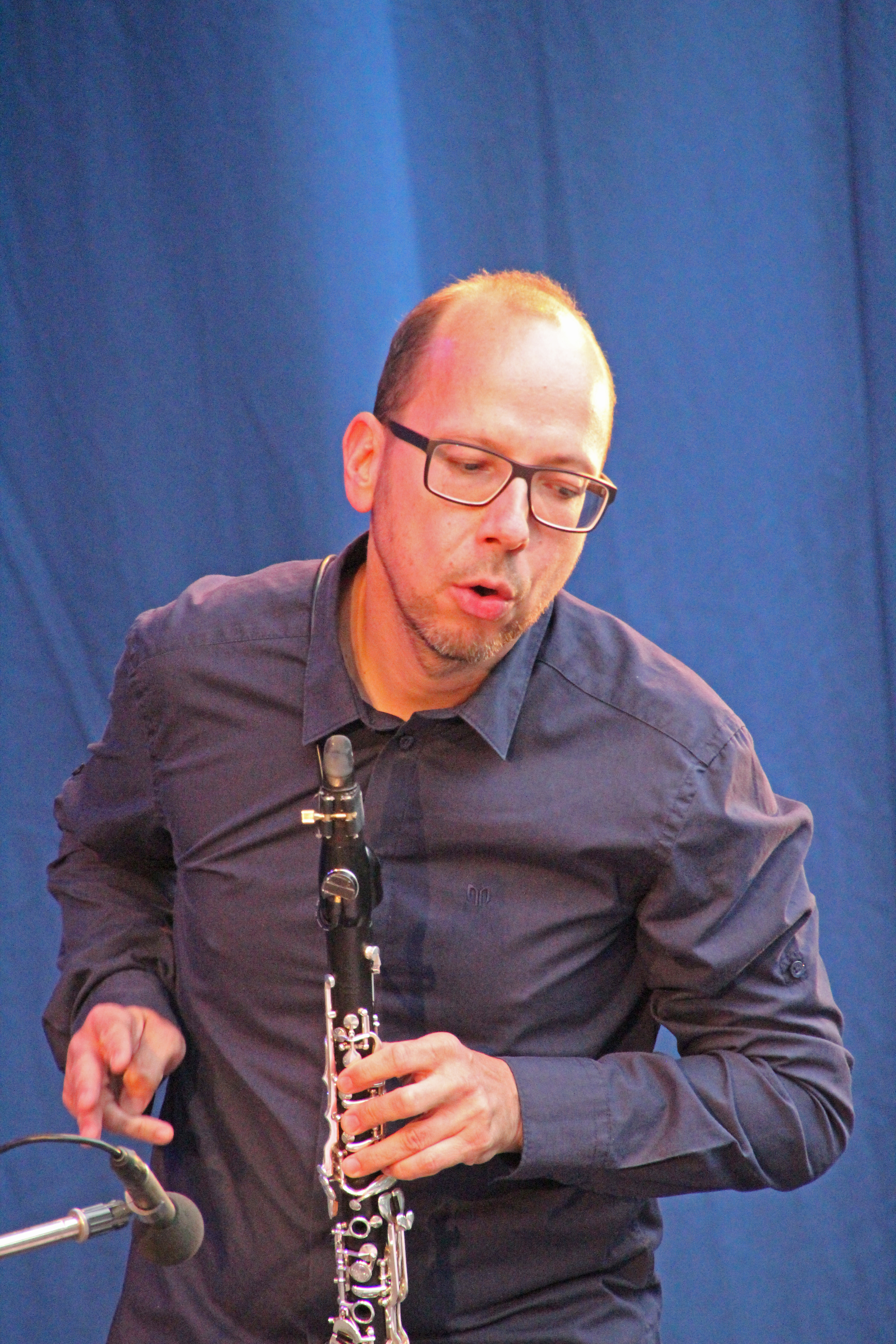 Bildinhalt: Oliver Leicht bei einem Auftritt im Palmengarten Aufnahmeort: Frankfurt am Main, Deutschland Die dargestellte Person wurde bei einem öffentlichen Auftritt fotografiert.